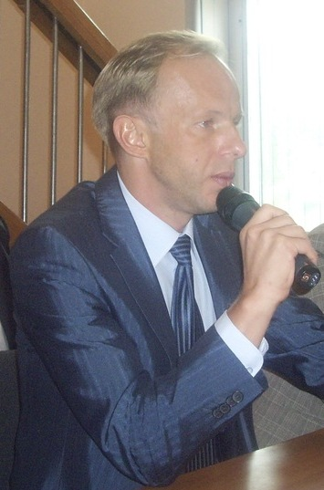 Фотография В. В. Шмидта